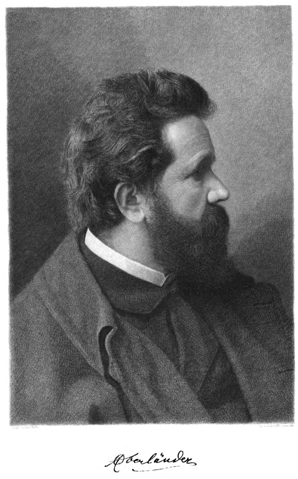 Adolf Oberländer. Potrait von Johann Lindner mit Signatur von Oberländer